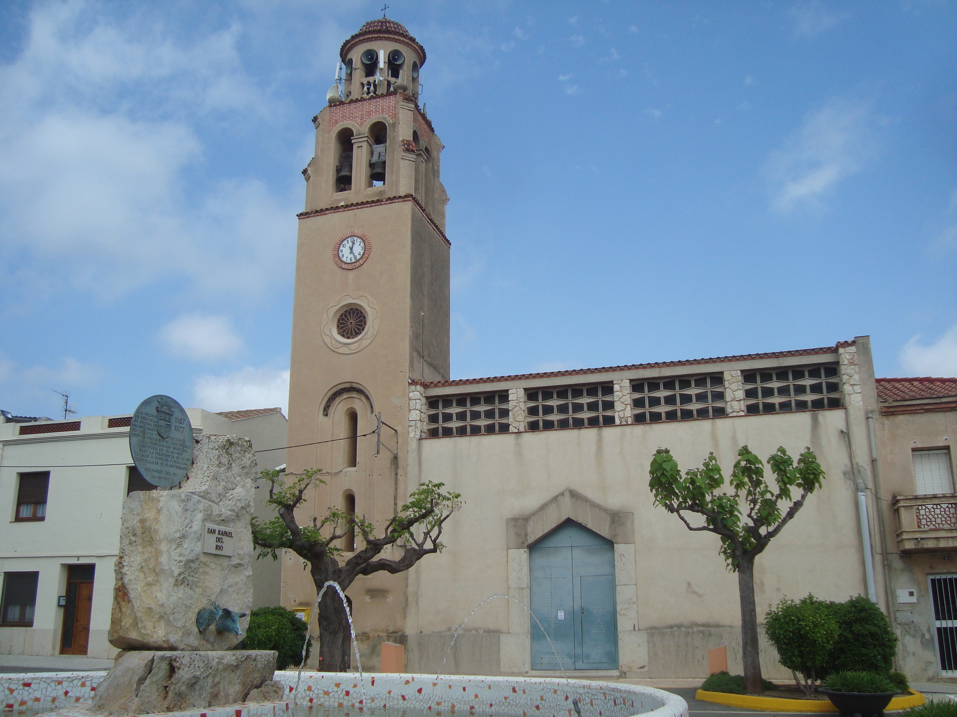 Església parroquial de Sant Rafel (Sant Rafel del Riu) 03.101-001.